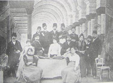 Mınakyan Yönetiminde Osmanlı Tiyatrosu Kadrosu